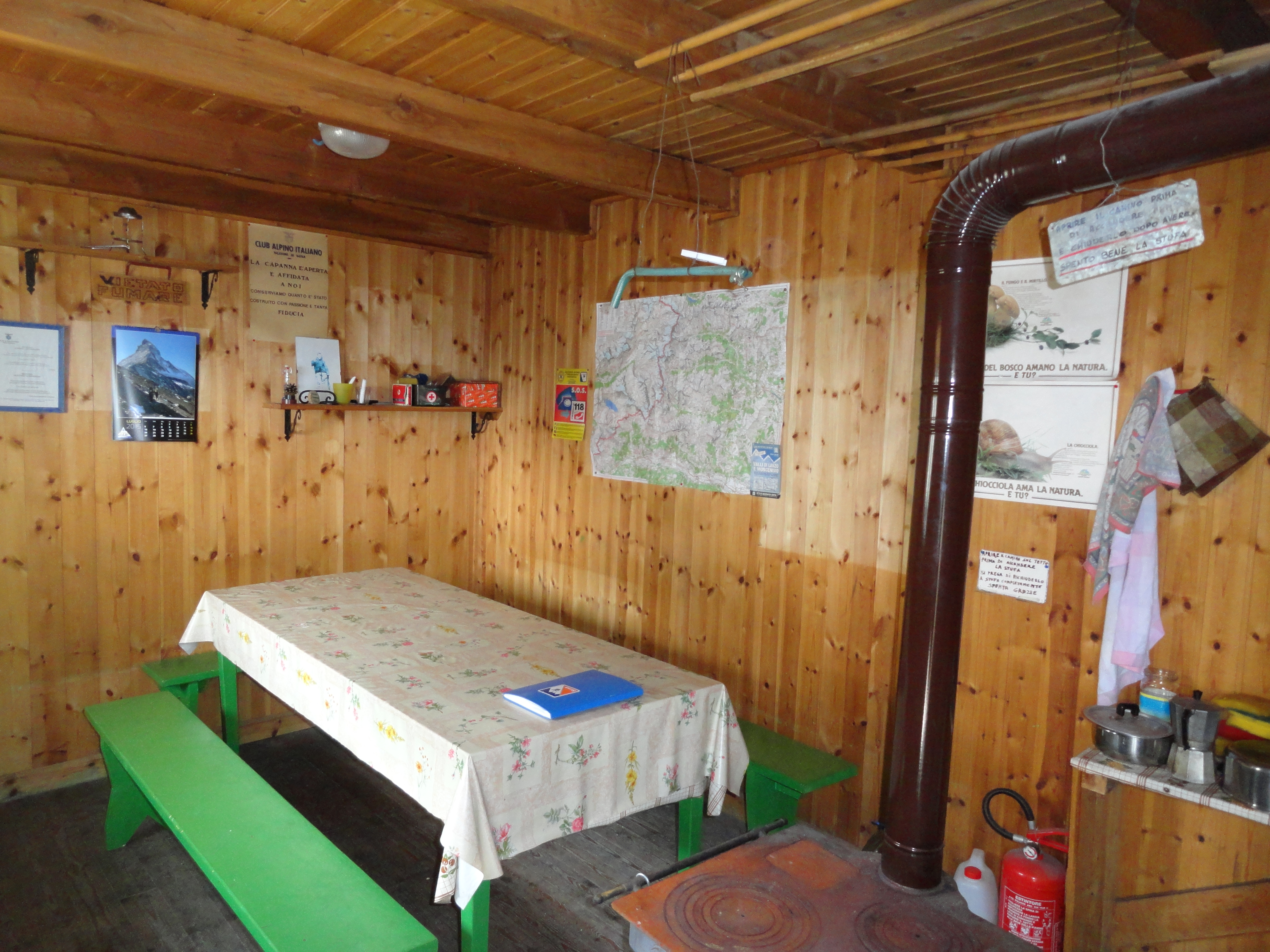 L'interno del Rifugio Piero Vacca